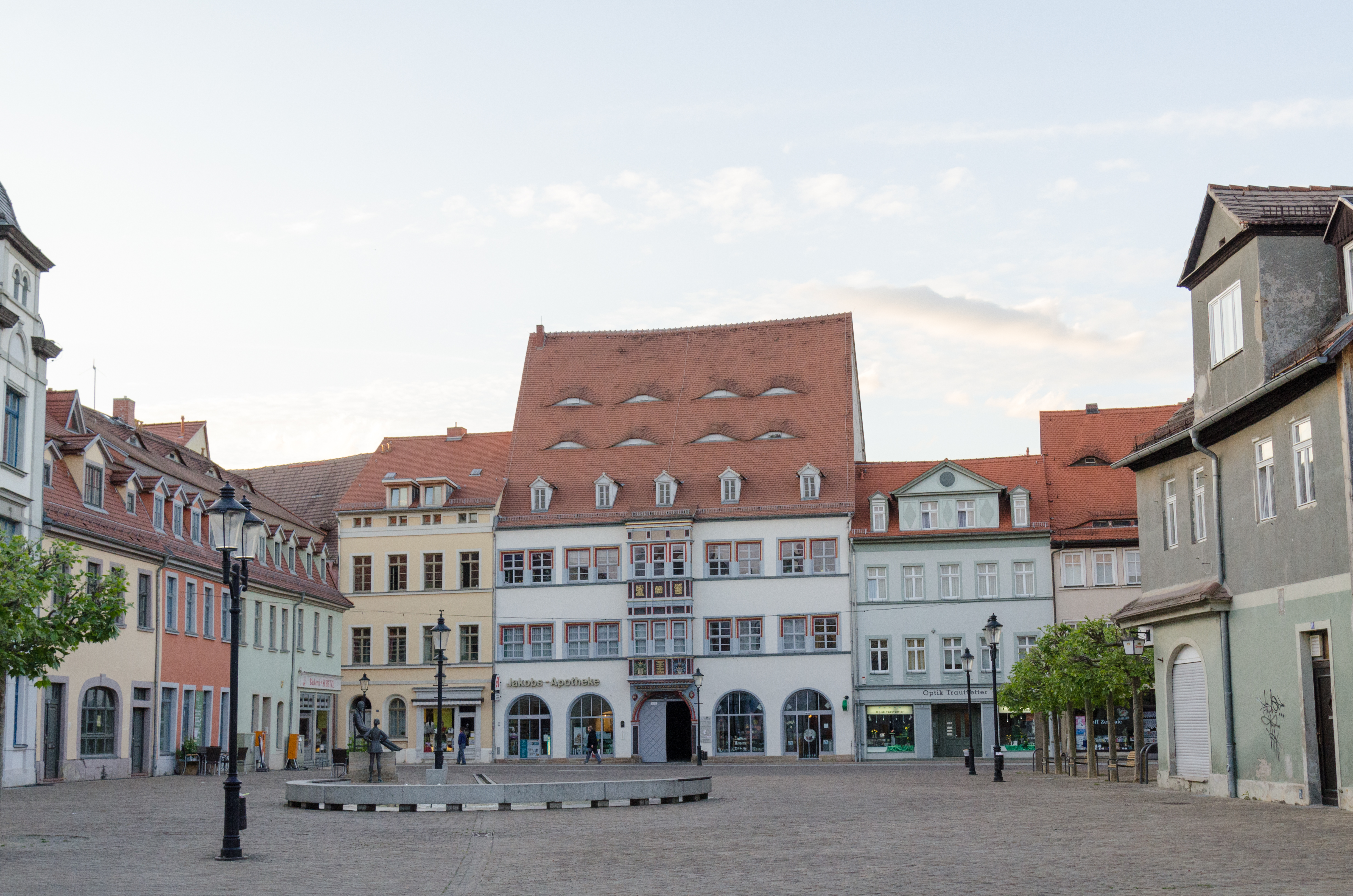 Naumburg, Holzmarkt